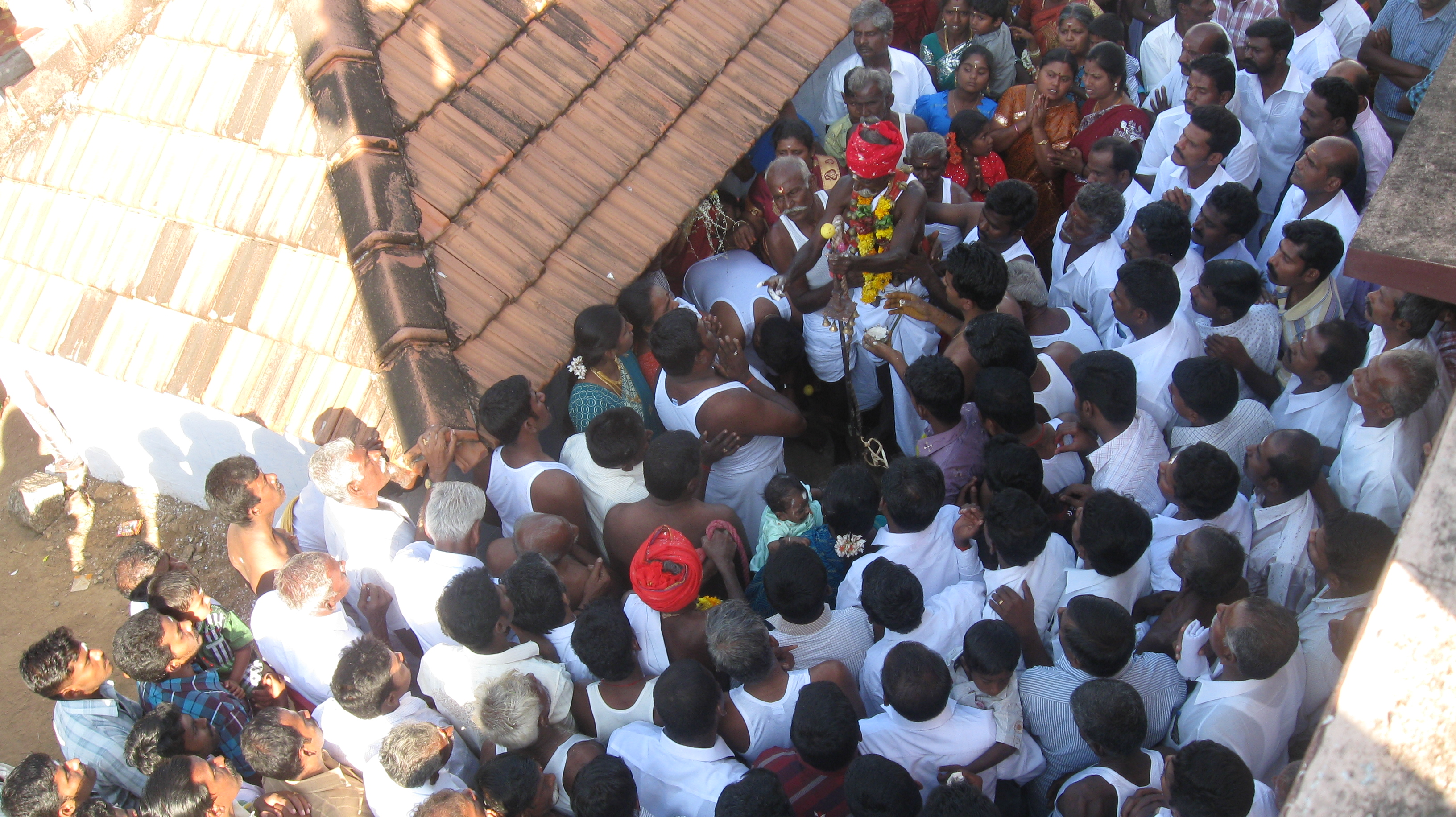 அரிவாளின்மீது நின்று கொண்டு சாமியாடி சுற்றியிருக்கும் பக்தர்களுக்கு அருள்பாலித்தல்.